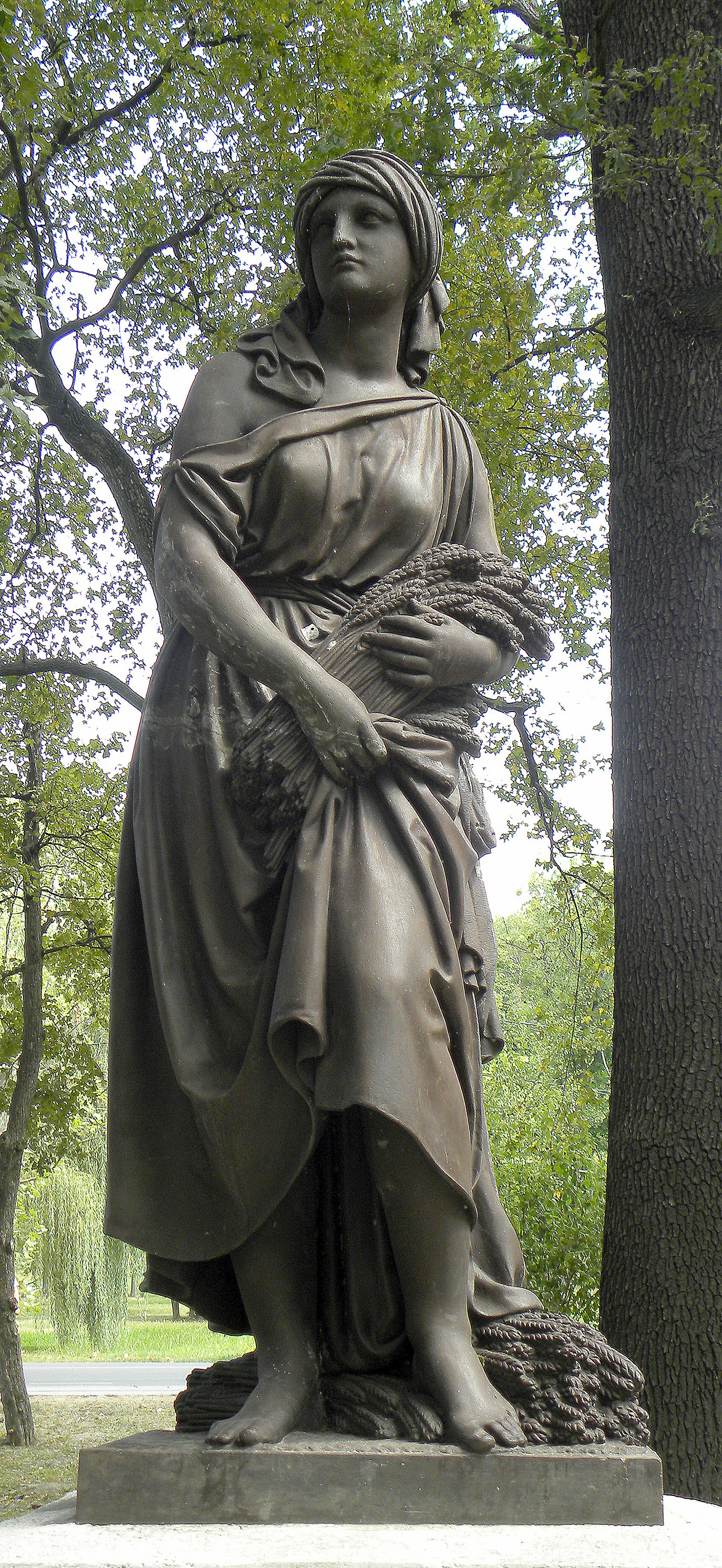 Beograd skulptura Žetelica u Topčiderskom parku